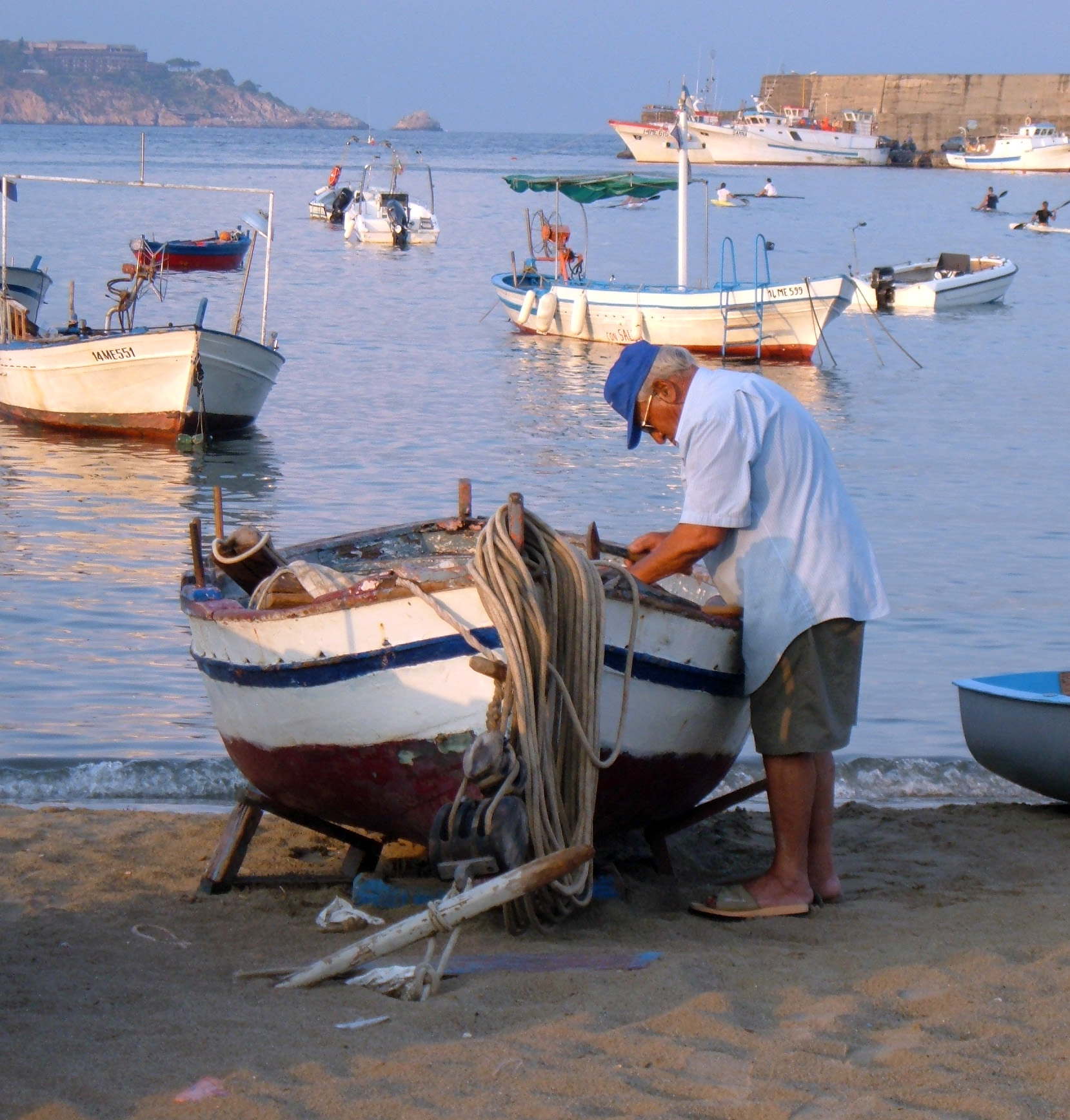 Marina, Giardini-Naxos, Sicilia, Italy.